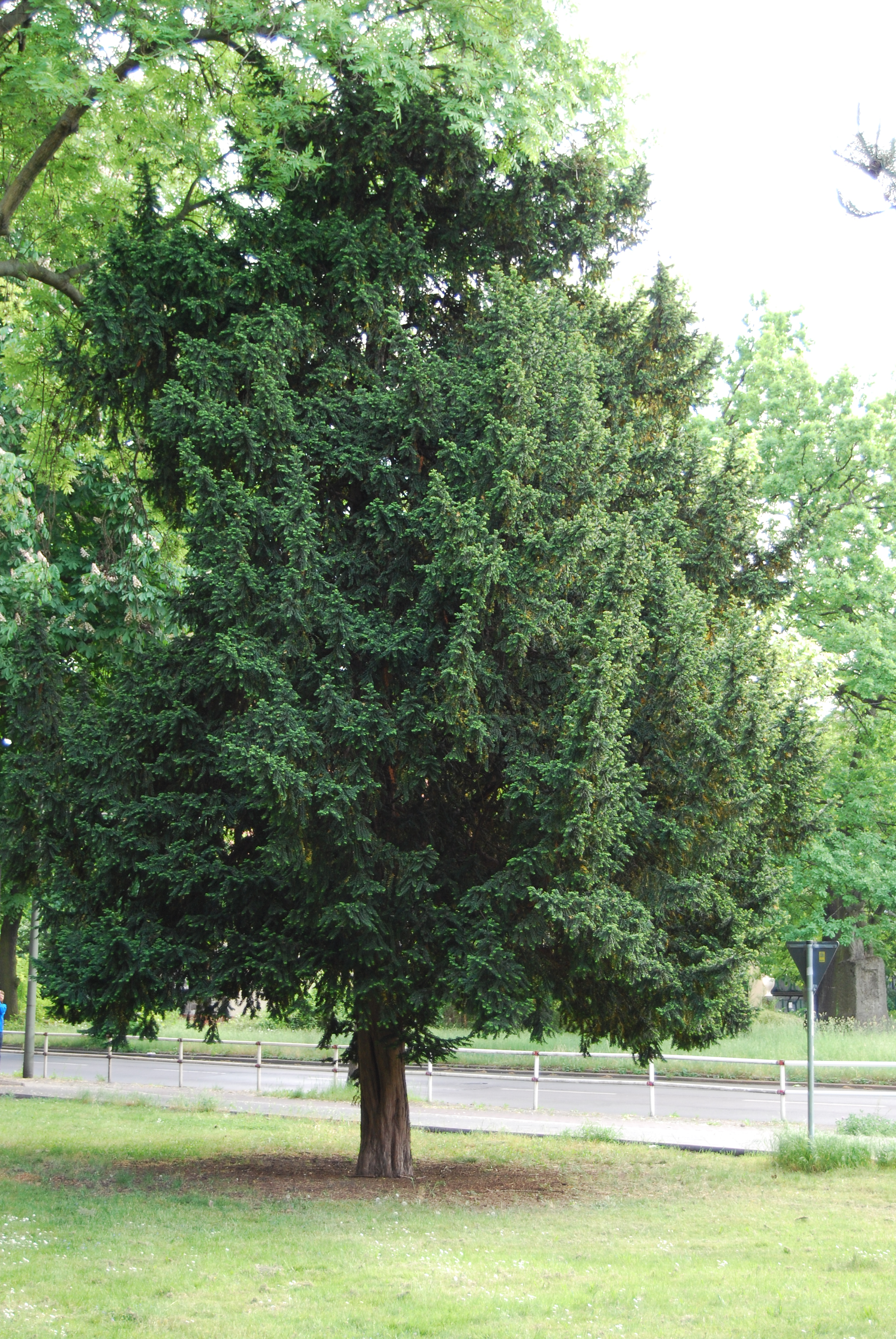 Naturdenkmal 11-27/B, Gemeine Eibe (Taxus baccata, Alter zirka 150 Jahre; Höhe etwa 15–20 m) in Berlin Lichtenberg, Möllendorffstraße 34-42, Gutspark. Schutzzweck: Schönheit, Seltenheit.